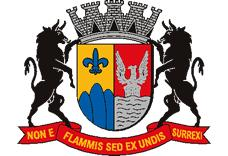 Brasão de Natividade da Serra